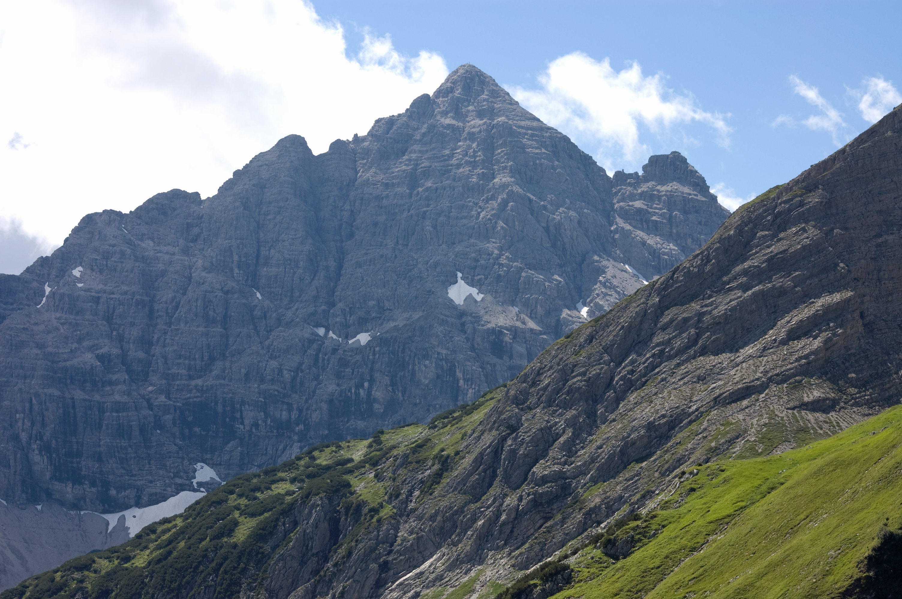 Die imposante Pyramide des Hochvogels vom Jubiläumsweg aus.